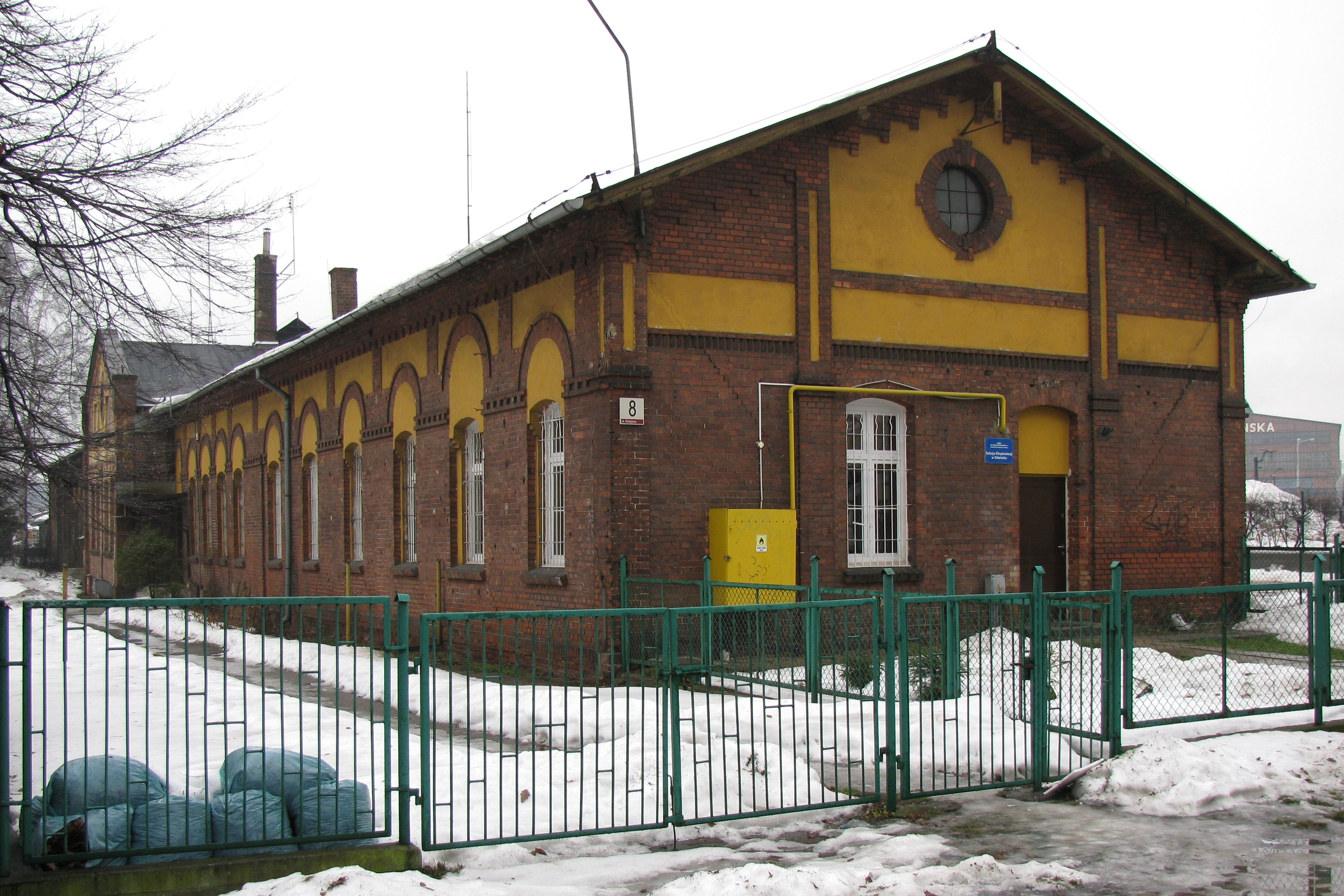 Dworzec Brama Oliwska - elewacja południowa.